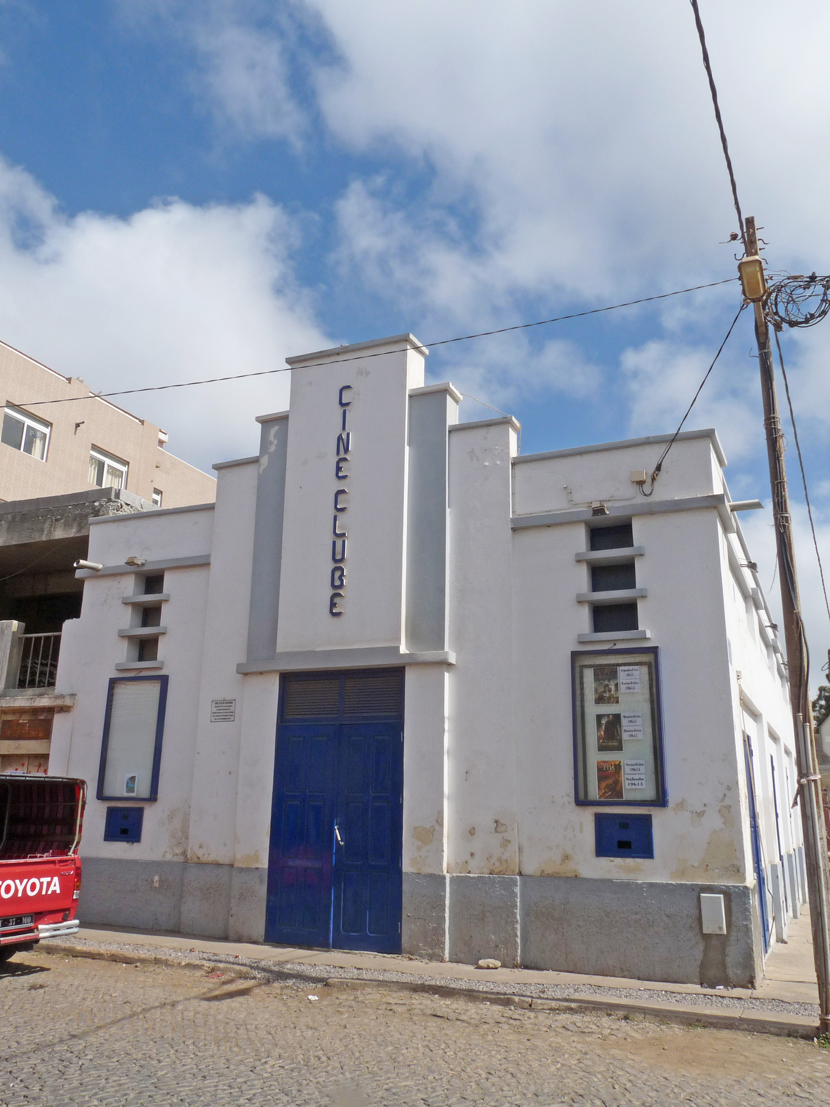 Cinéma à Assomada (île de Santiago, Cap-Vert)